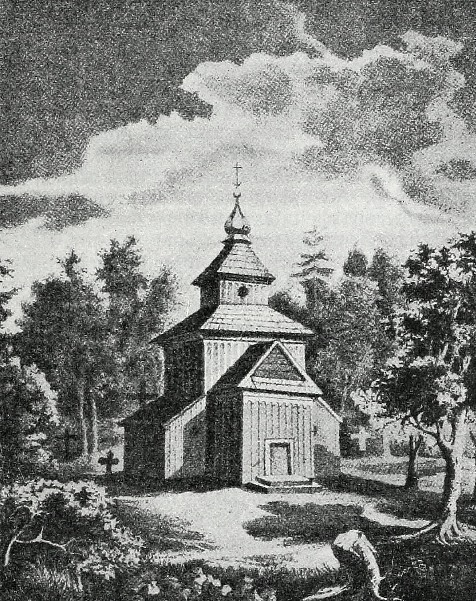 Церковь Святой Троицы в селе Вербки, близ города Ковеля, где находится гробница князя Андрея Михайловича Курбского (с гравюры 1848 года). Эта картинка была использована для иллюстрирования статьи «Курбские, князья» опубликованной в четырнадцатом томе «Военной энциклопедии», который был издан книгоиздательским товариществом И. Д. Сытина в 1914 году в столице Российской империи городе Санкт-Петербурге. Более подробное описание к этому рисунку можно прочесть в указанной выше статье на сайте Русской Викитеки.